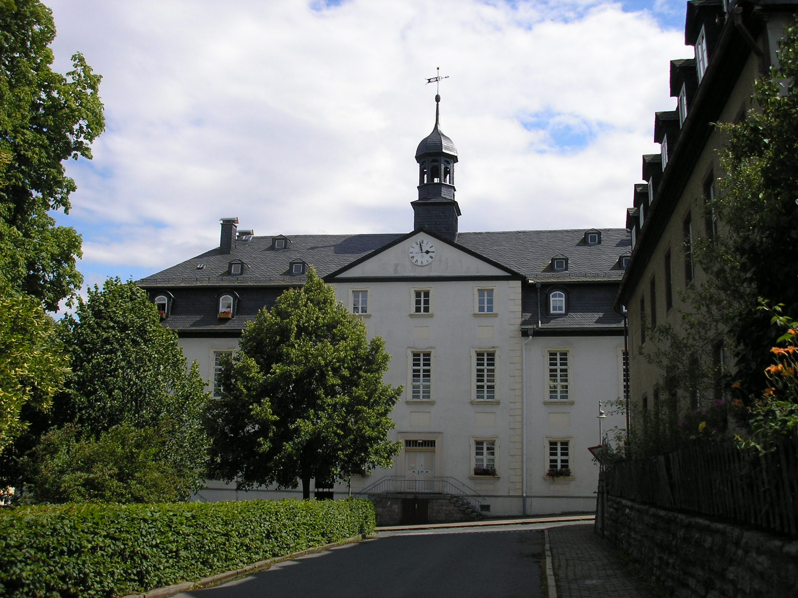 Häuser der Herrnhuter Brüdergemeine in Ebersdorf (Thüringen).